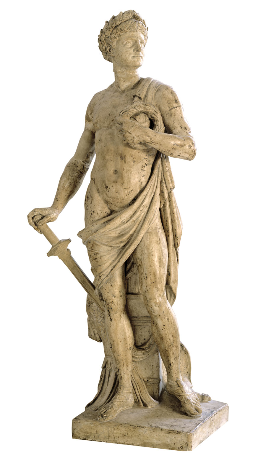 Carl Frederik Stanley (ca. 1738-1813), "Amor patriae. Allegori på kærlighed til fædrelandet", 1777. Statens Museum for Kunst / National Gallery of Denmark.